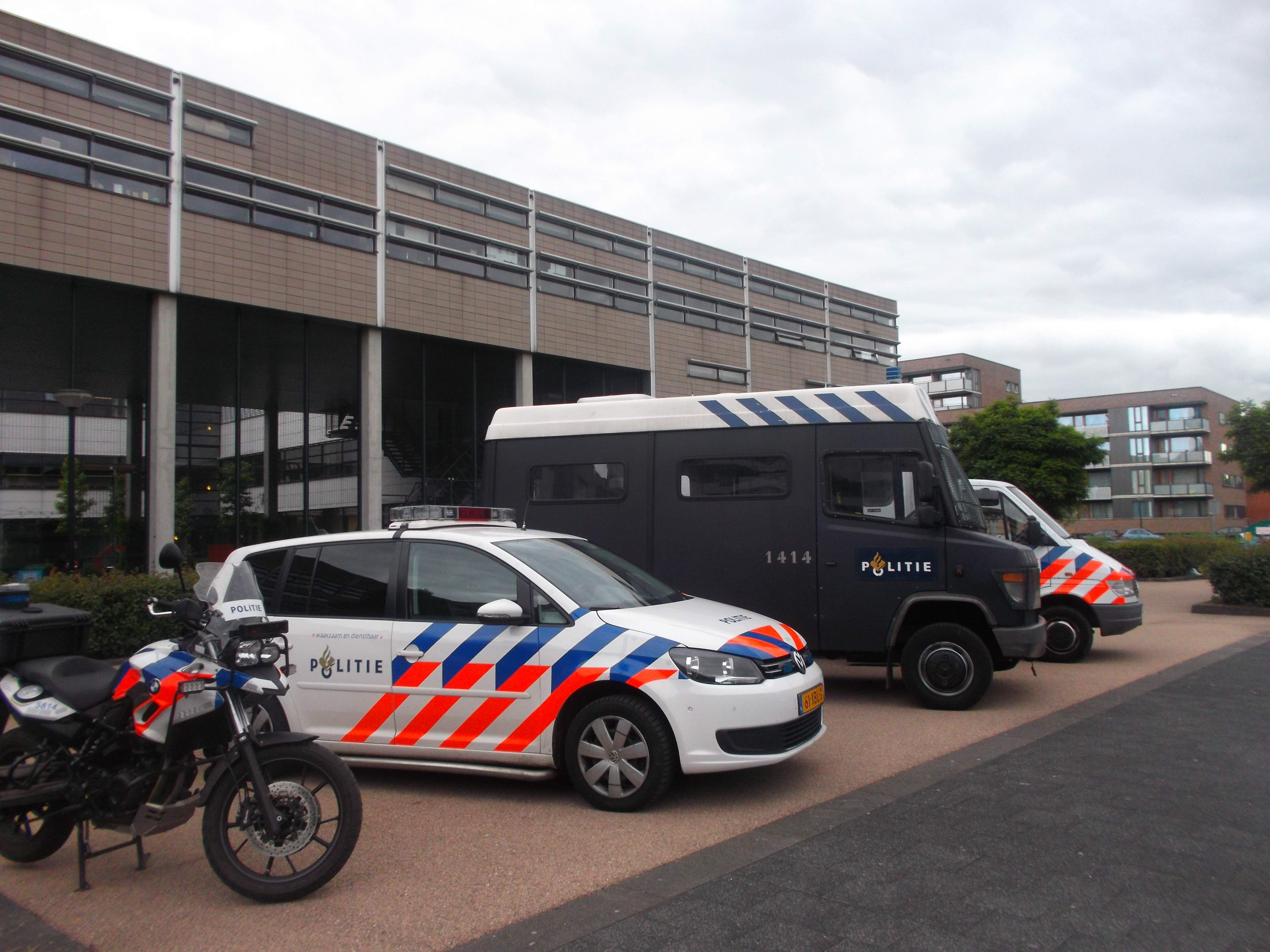 Politievoertuigen in Amsterdam-Zuidoost, bij een 'bootcamp' voor het goede doel op 20 juni 2015, waar ook het leger bij was. In het gebouw achter de wagens was een inzamelingsactie voor een Afrikaans land.